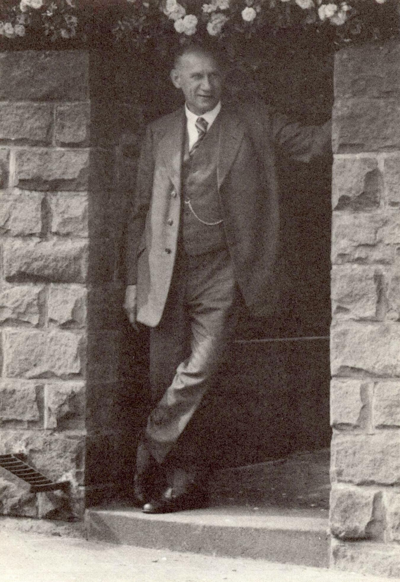 Paul Münch, Pfälzer Heimatpoet